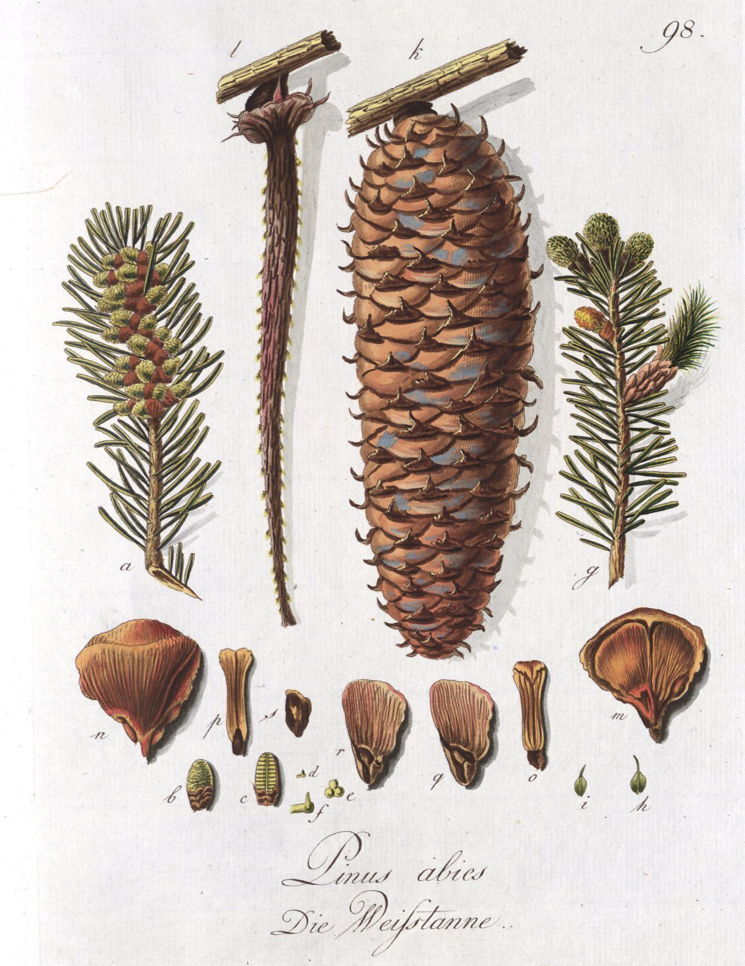 Abbildung Der Hundert Deutschen Wilden Holz-Arten Nach Dem Nummern-Verzeichnis Im Forst-Handbuch Von F. A. L. Von Burgsdorf; Tafel: Die Weißtanne. Pinus abies (du Roi.) P. picea Linn. Silber- oder Edeltanne. Erklärung